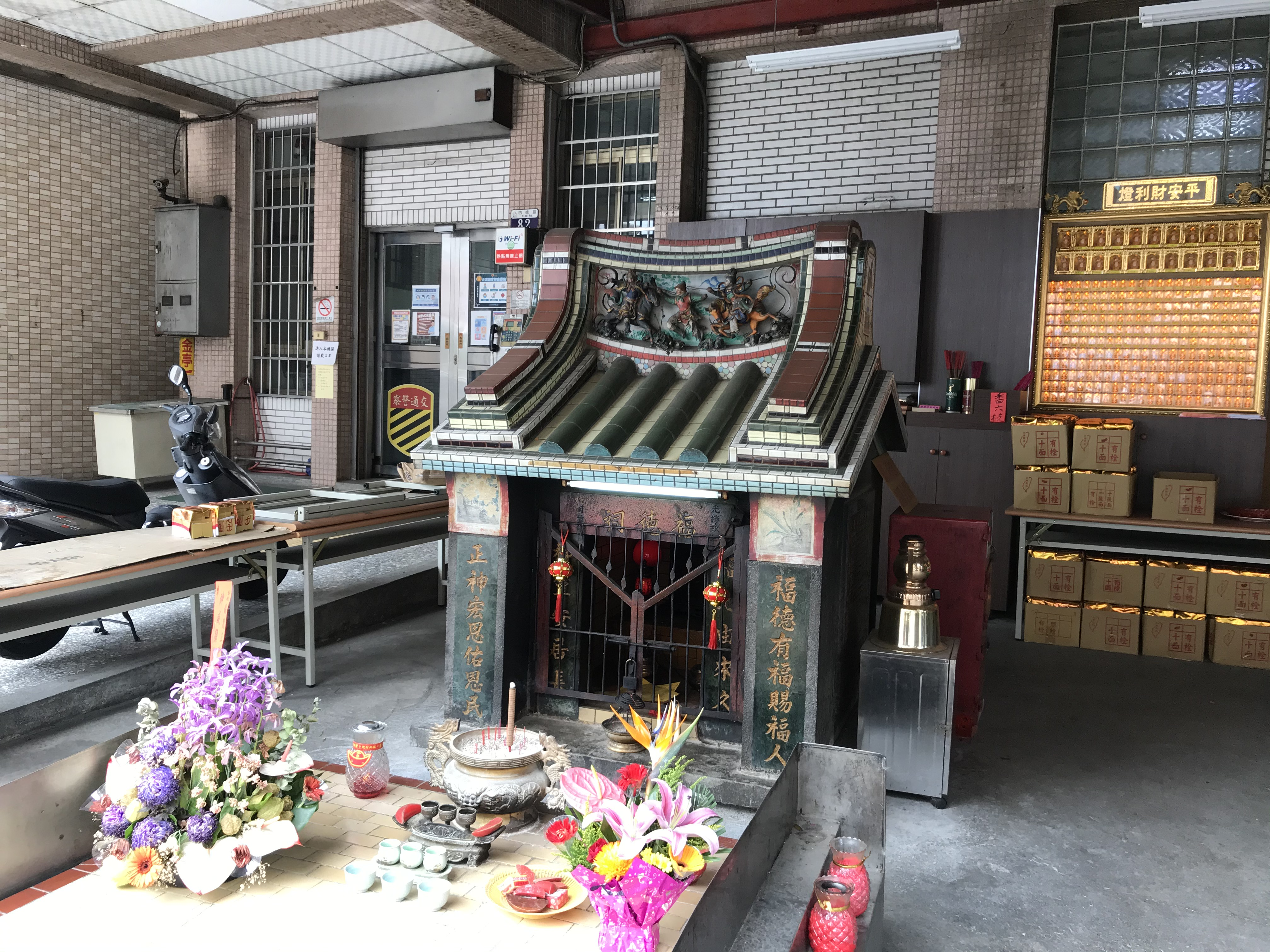 中文（台灣）: 阿罩霧福德祠